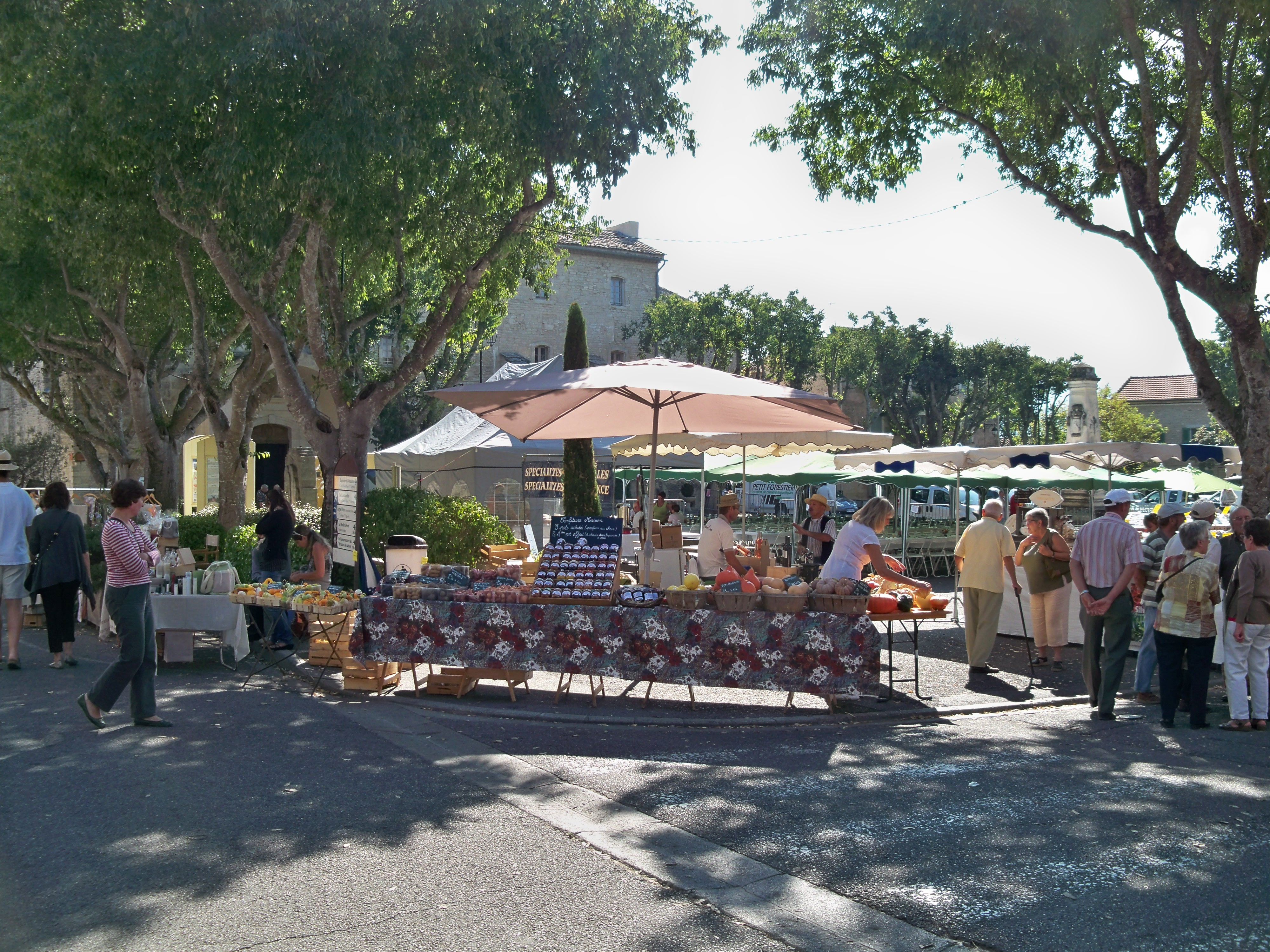 Marché à Goult (84)